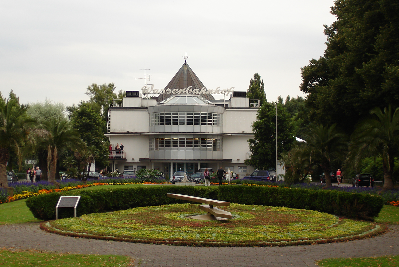 Wasserbahnhof at Mülheim an der Ruhr